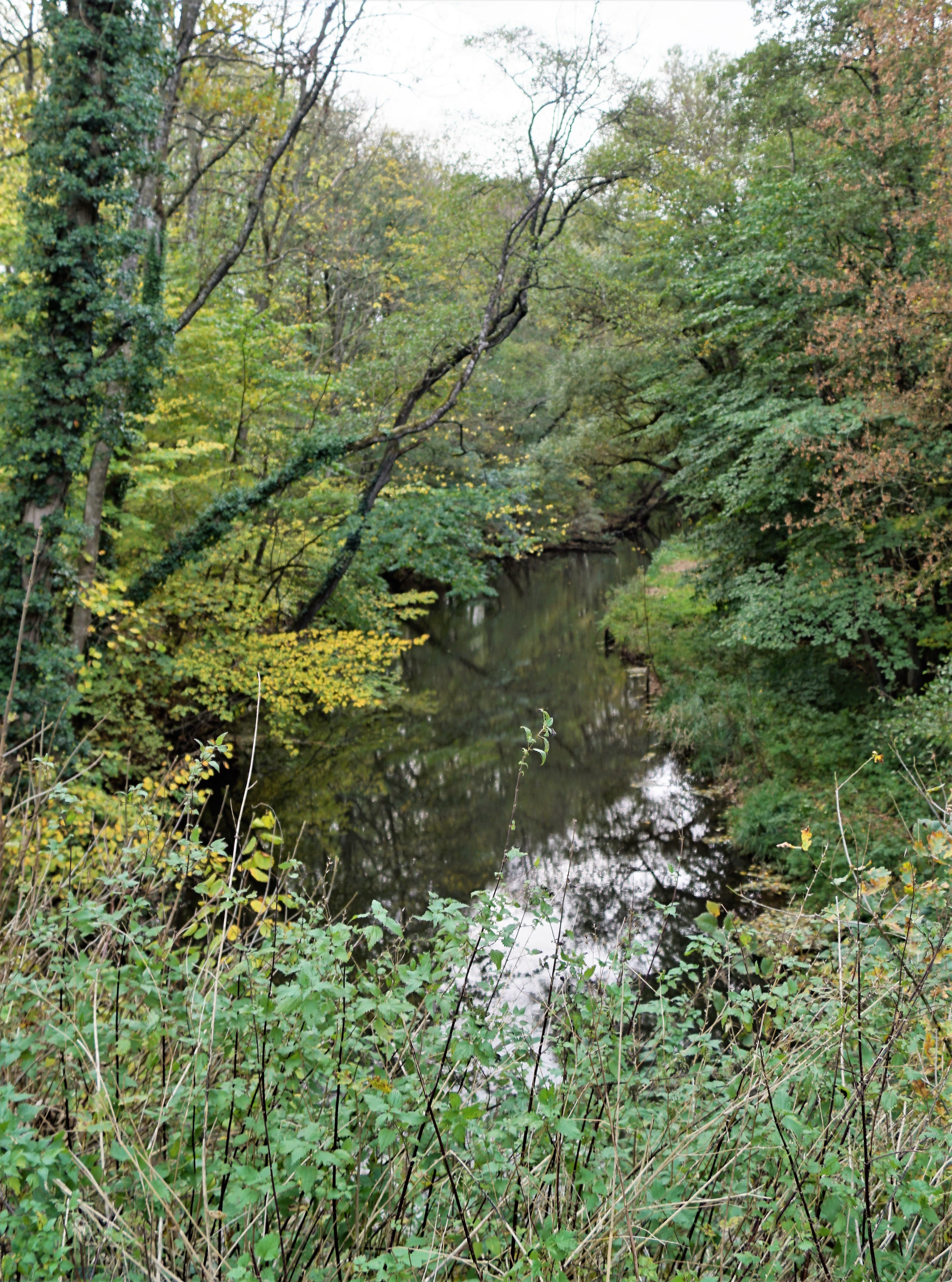 Bygholm Å vest for søen